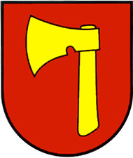 Herb miasteczka Toporów XVII wiek